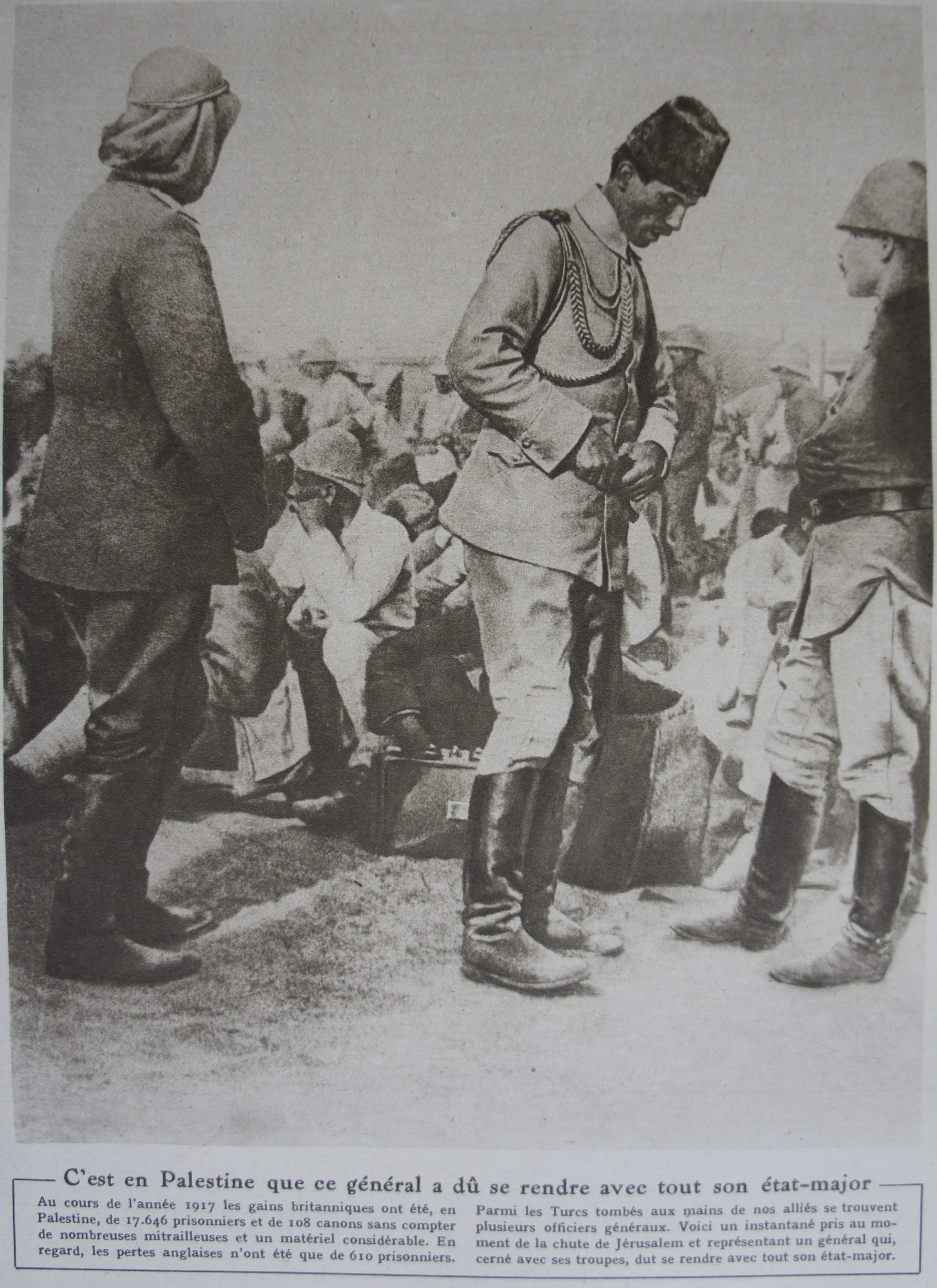 Le Miroir N°221, page 5 présentation d'un général turc prisonnier à Jérusalem.